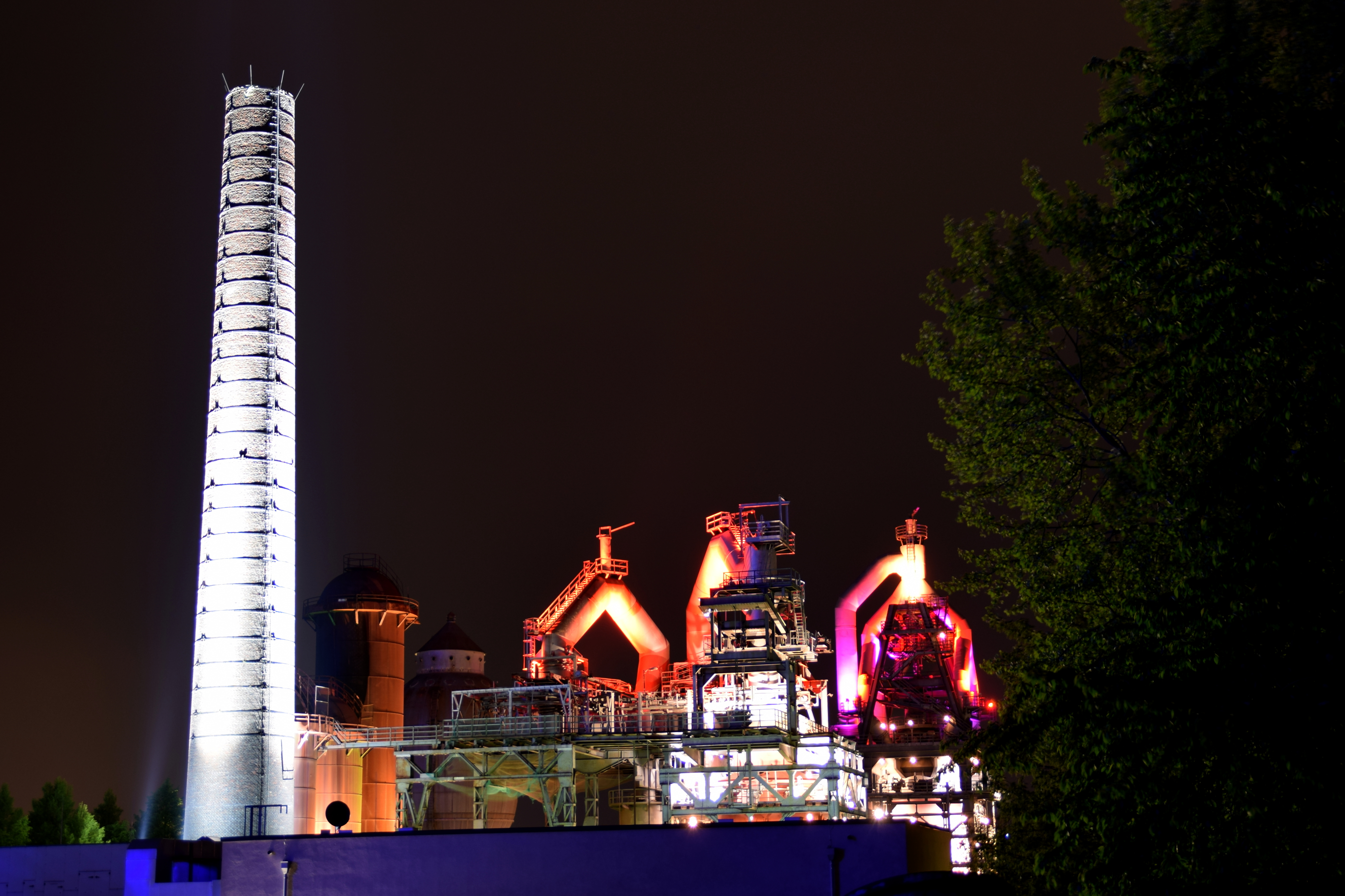 Hochöfen des alten Hüttenareals bei Nachtbeleuchtung in Neunkirchen (Saar)